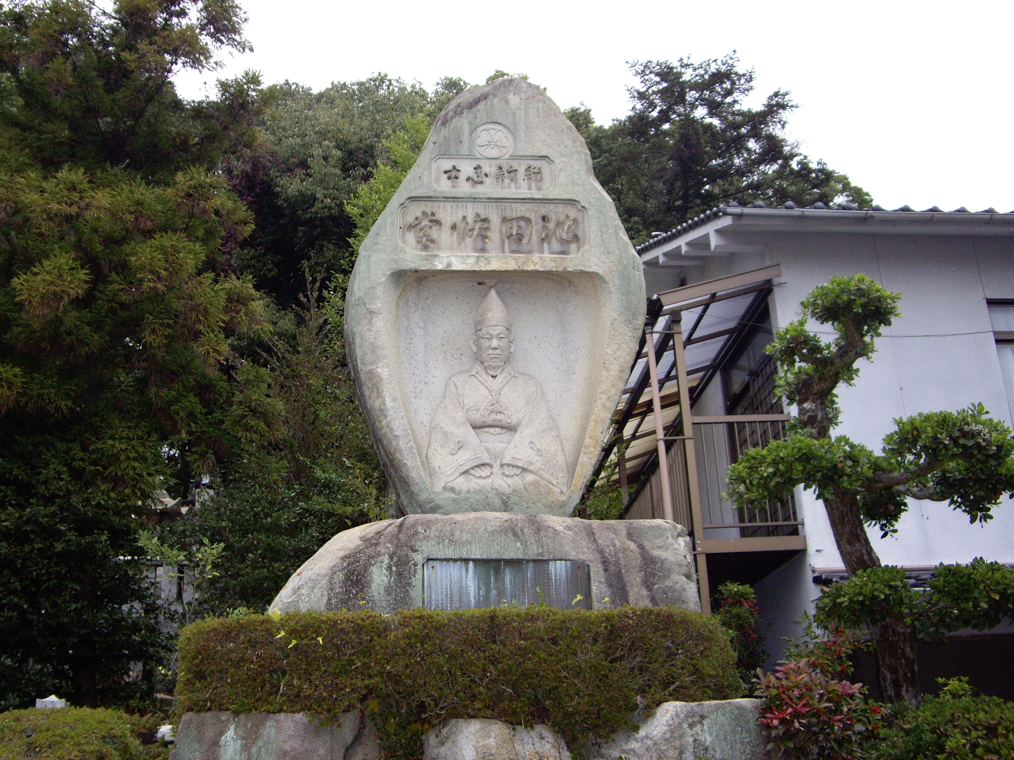 池田快堂碑